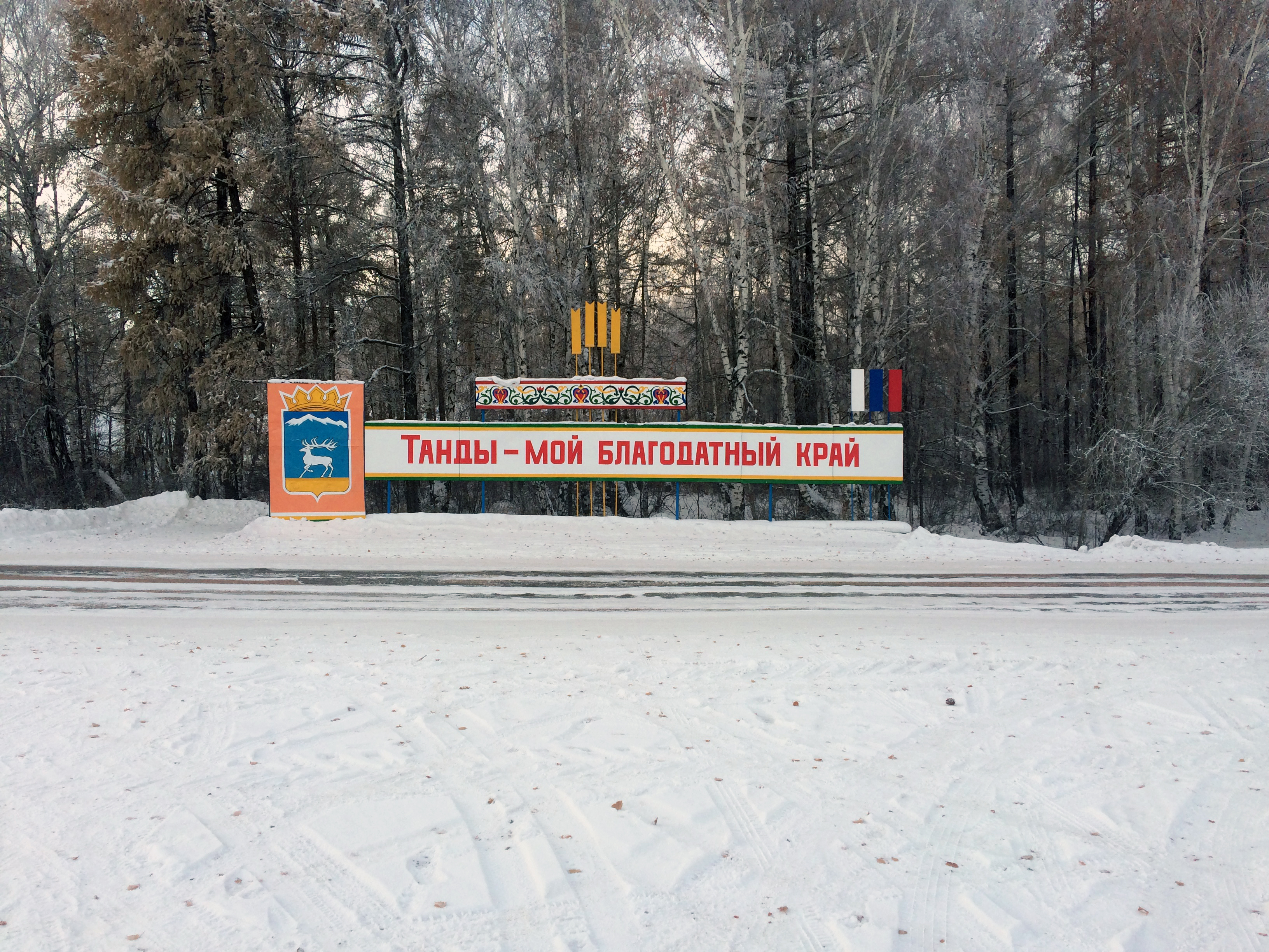 Приглашение в Таңдынский кожуунный центр – сумон Бай-Хаак. Тыва дыл: Бай-Хаак сумуда Таңдыже чалалга-бижик